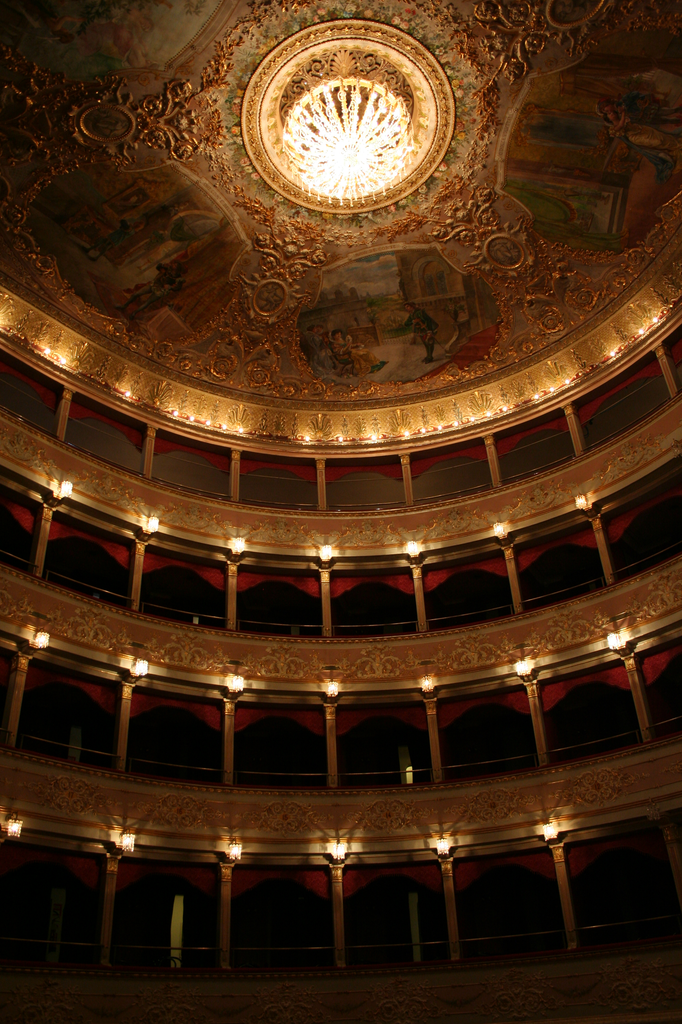 Teatro Filippo Marchetti This is a photo of a monument which is part of cultural heritage of Italy.